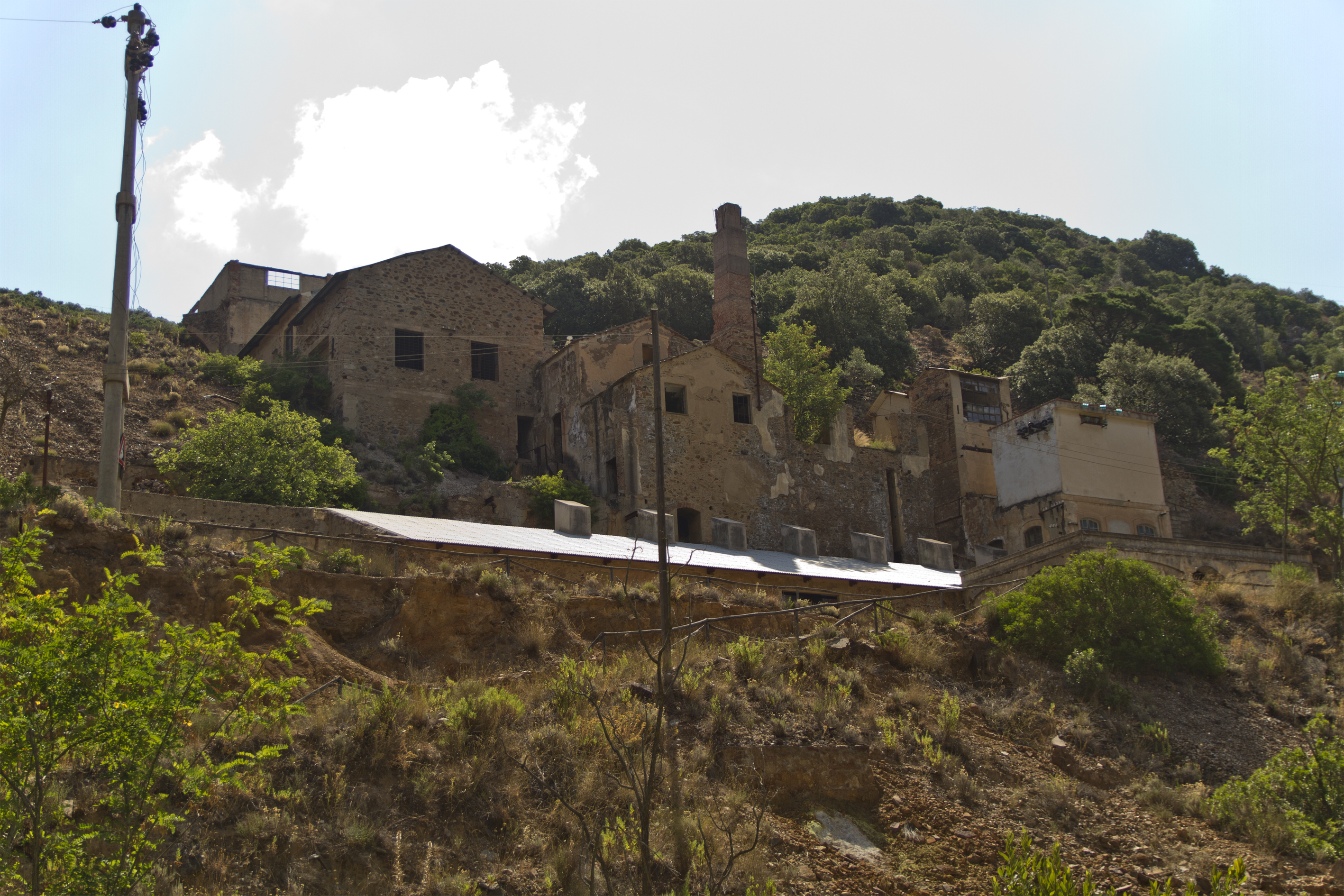 Miniera su Zurfuru, Fluminimaggiore, Carbonia-Iglesias, Sardinia, Italy